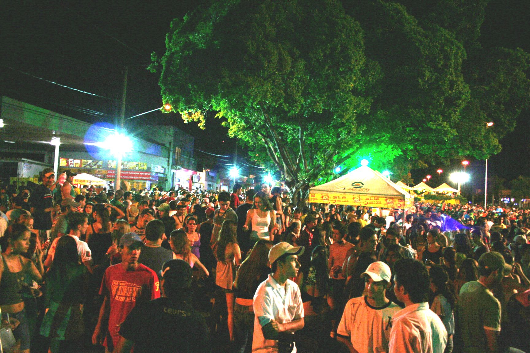 Foto do Carnaval de Jardim